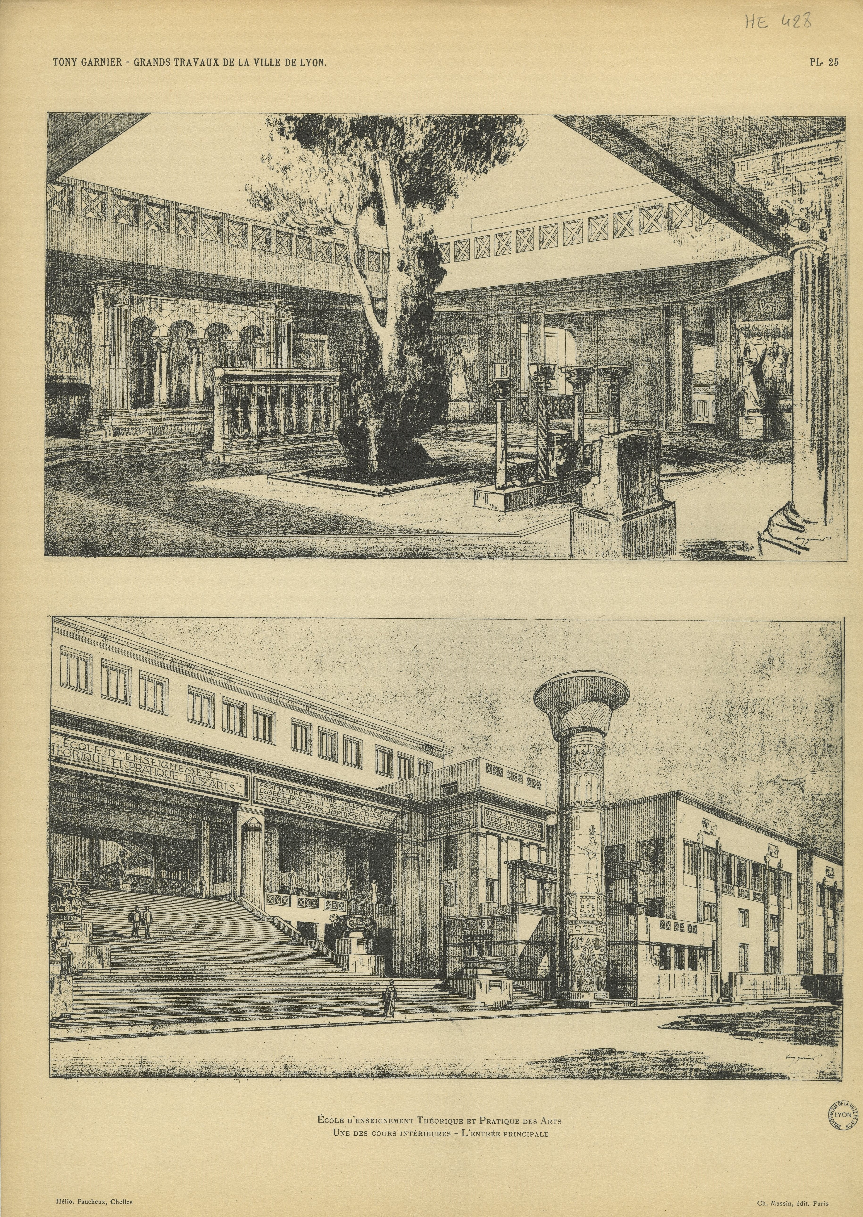 École d’enseignement théorique et pratique des arts : une des cours intérieures, l’entrée principale par Tony Garnier (pl. 25) du recueil "Les grands travaux de la ville de Lyon [Livre] : études, projets et travaux exécutés (hôpitaux, écoles, postes, abattoirs, habitations en commun, stade, etc.)" en 1921